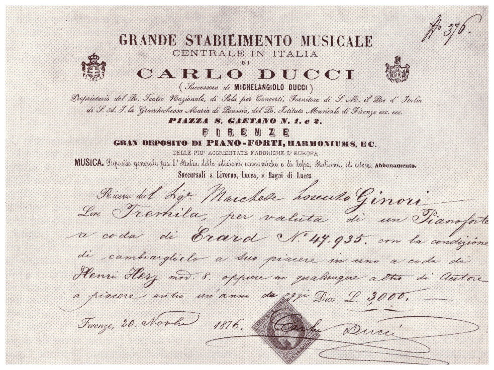 Intestazione della Carta da Lettere di Carlo Ducci - Grande Stabilimento Musicale